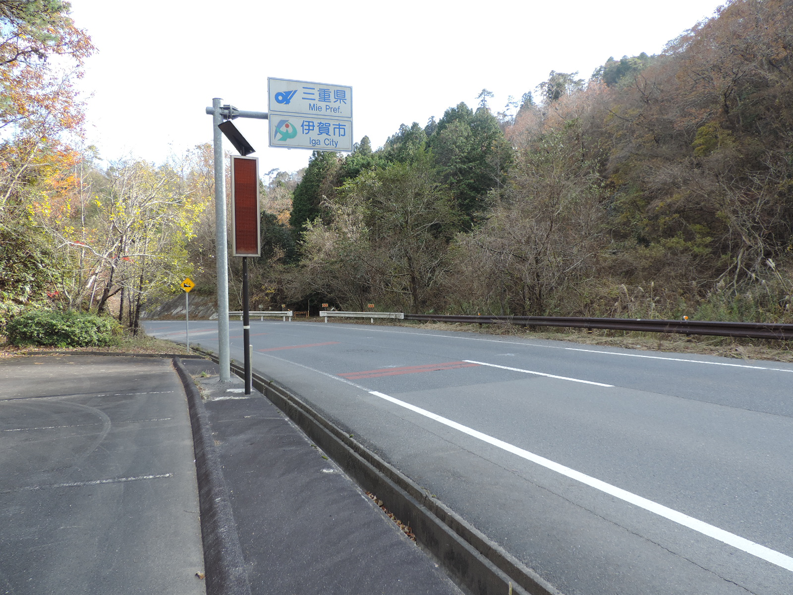 国道422号桜峠（下り線伊賀市方面を臨む）。2017年撮影